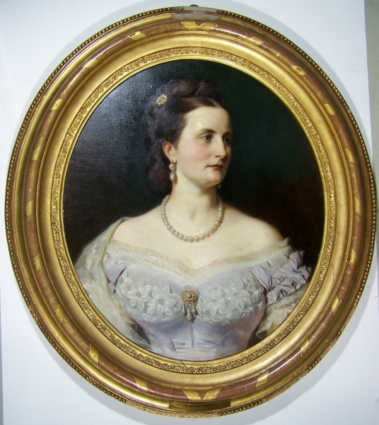 Prinzessin Antoinette von Sachsen-Altenburg